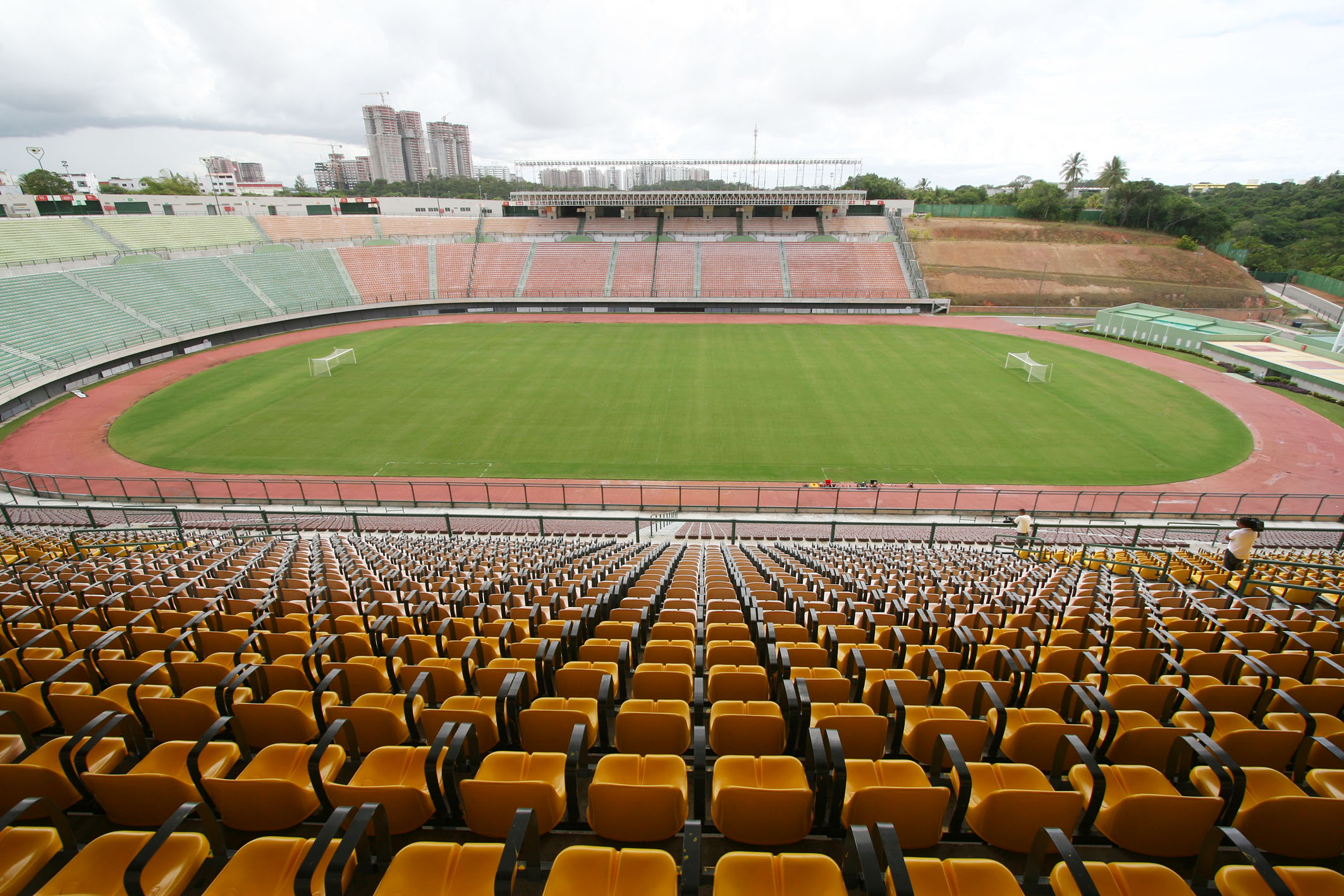 Vistoria nos estádios baianos pelo Comitê Organizador Local da Copa 2014 Na foto: Estádio Roberto Santos (Pituaçu) Autora: Carol Garcia / AGECOM